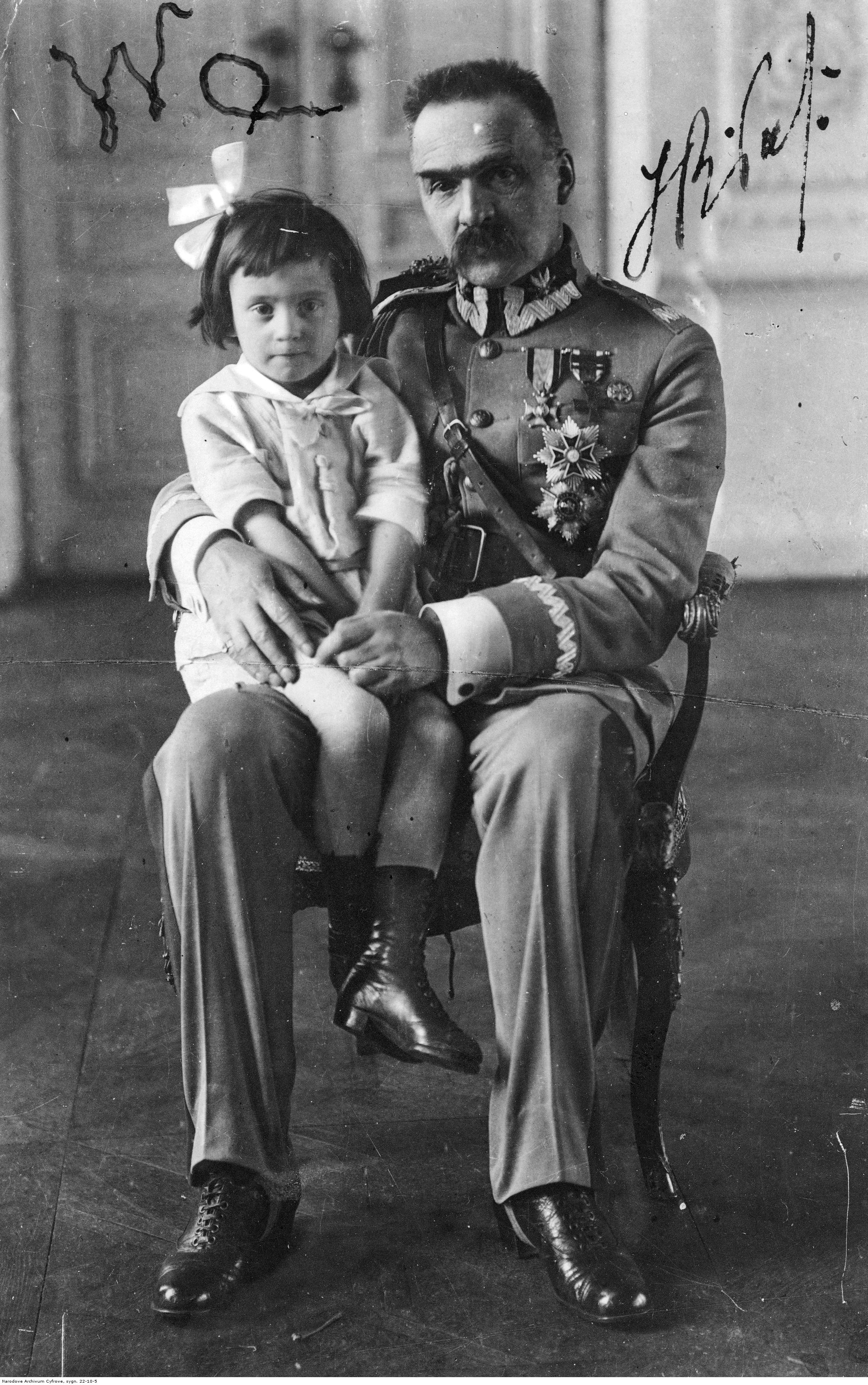 Józef Piłsudski, marszałek Polski z córką Wandą.